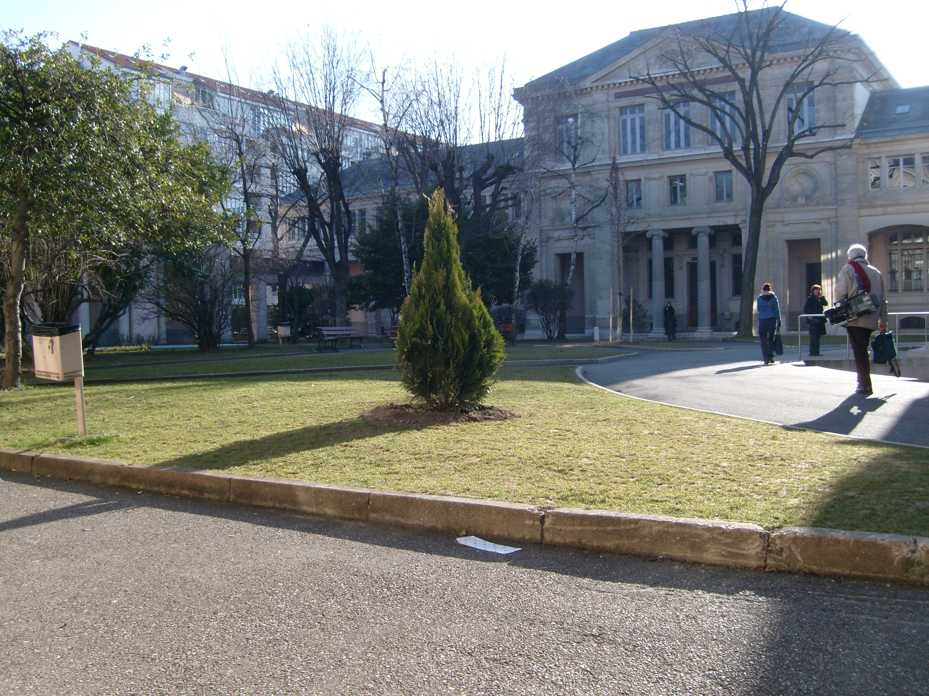 Vue de la cour intérieure entre les bâtiments Clio et Fugier, campus des Berges du Rhône, Université Lyon 2 - Lumière.